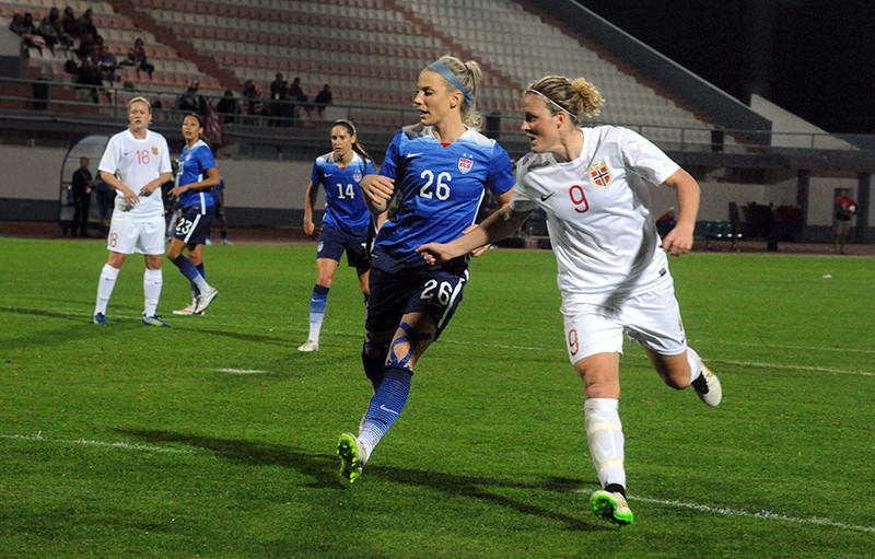 a_56_5583